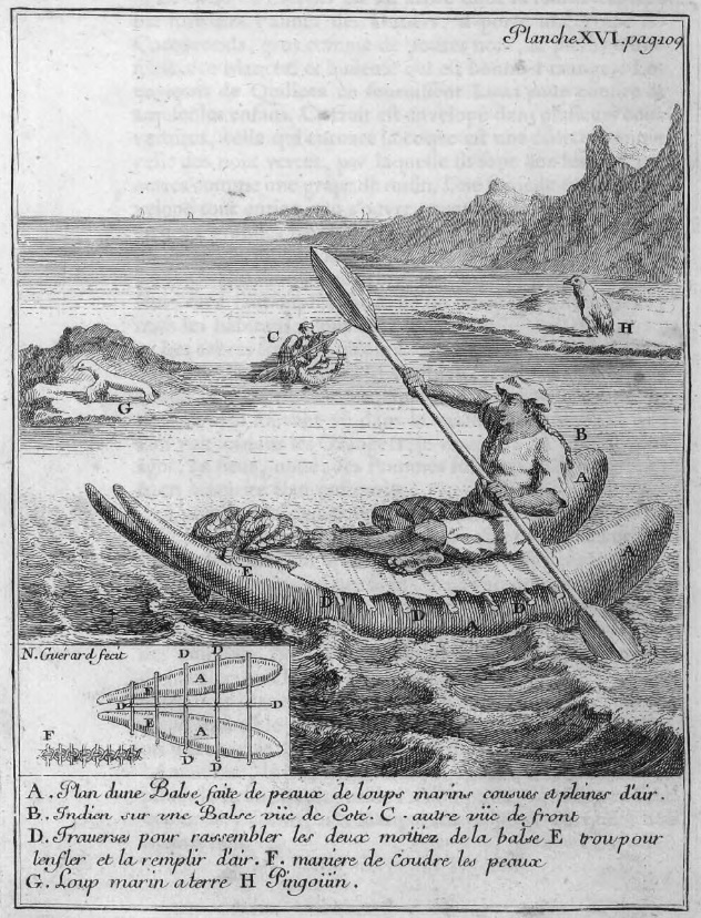 Balsa de Cuero de Lobo, Nicolas Guérard, en Amadeo Frezier 1716